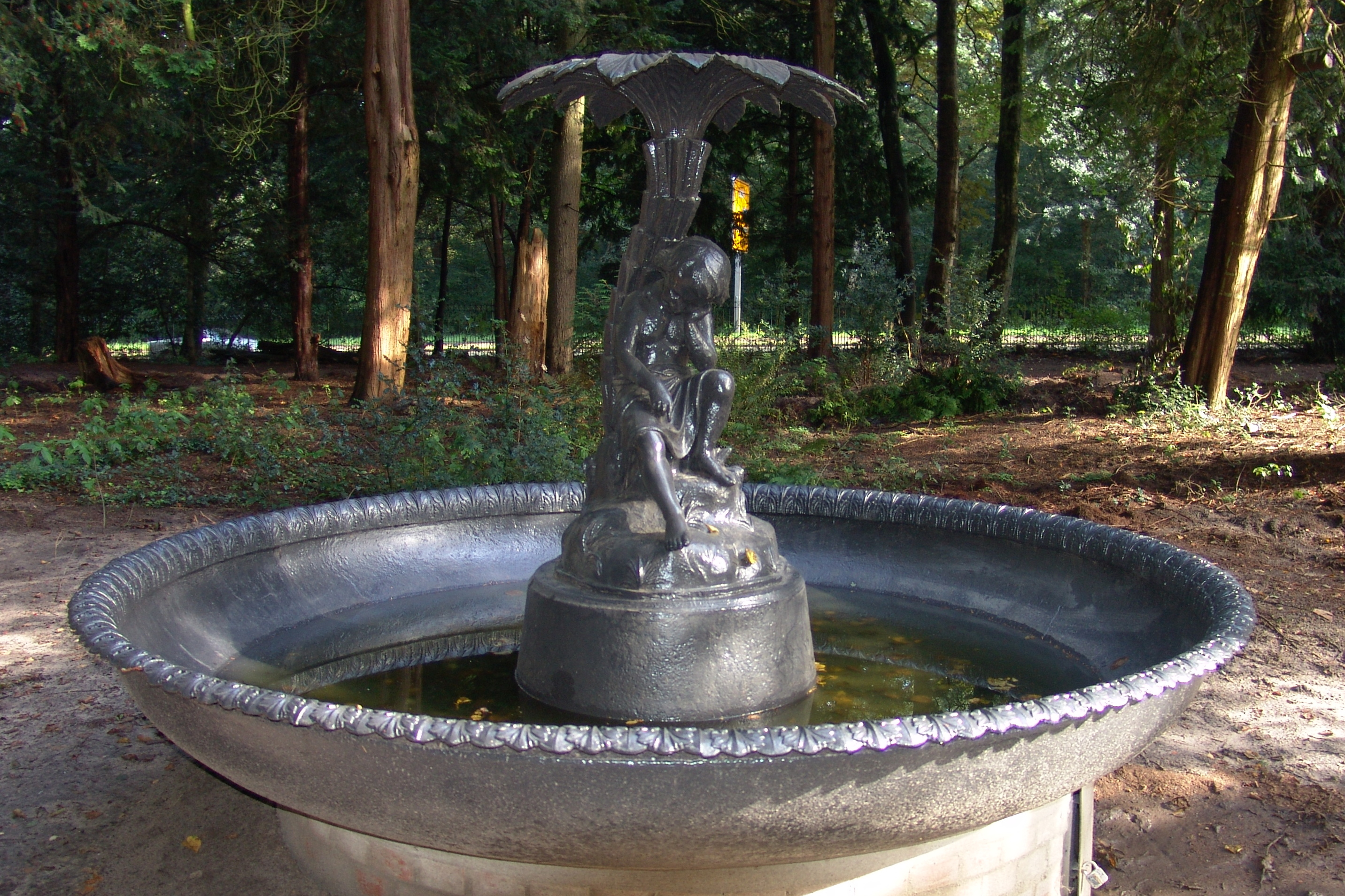 Wätjens Landgut, Wätjens Brunnen.Die Gesamtanlage ist ein geschütztes Kulturdenkmal in der Freien Hansestadt Bremen, mit der Nr. 1762 beim Landesamt für Denkmalpflege registriert.